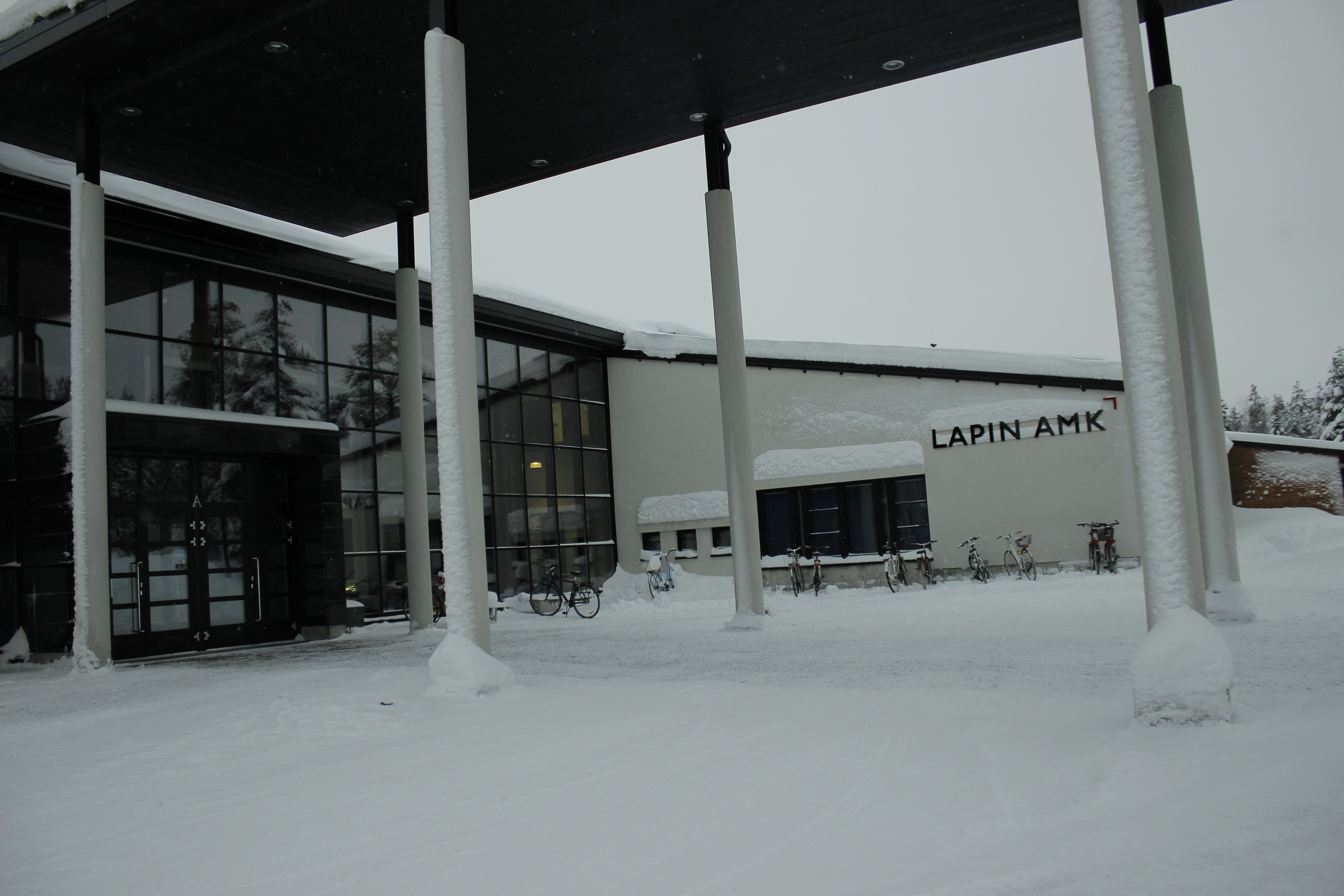 Kivikossa sijaitsee Lapin amk:n tekniikan yksikkö